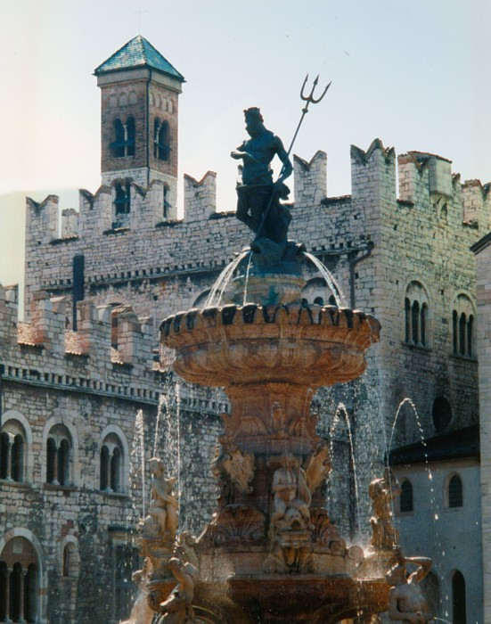 Trento: Piazza Duomo.